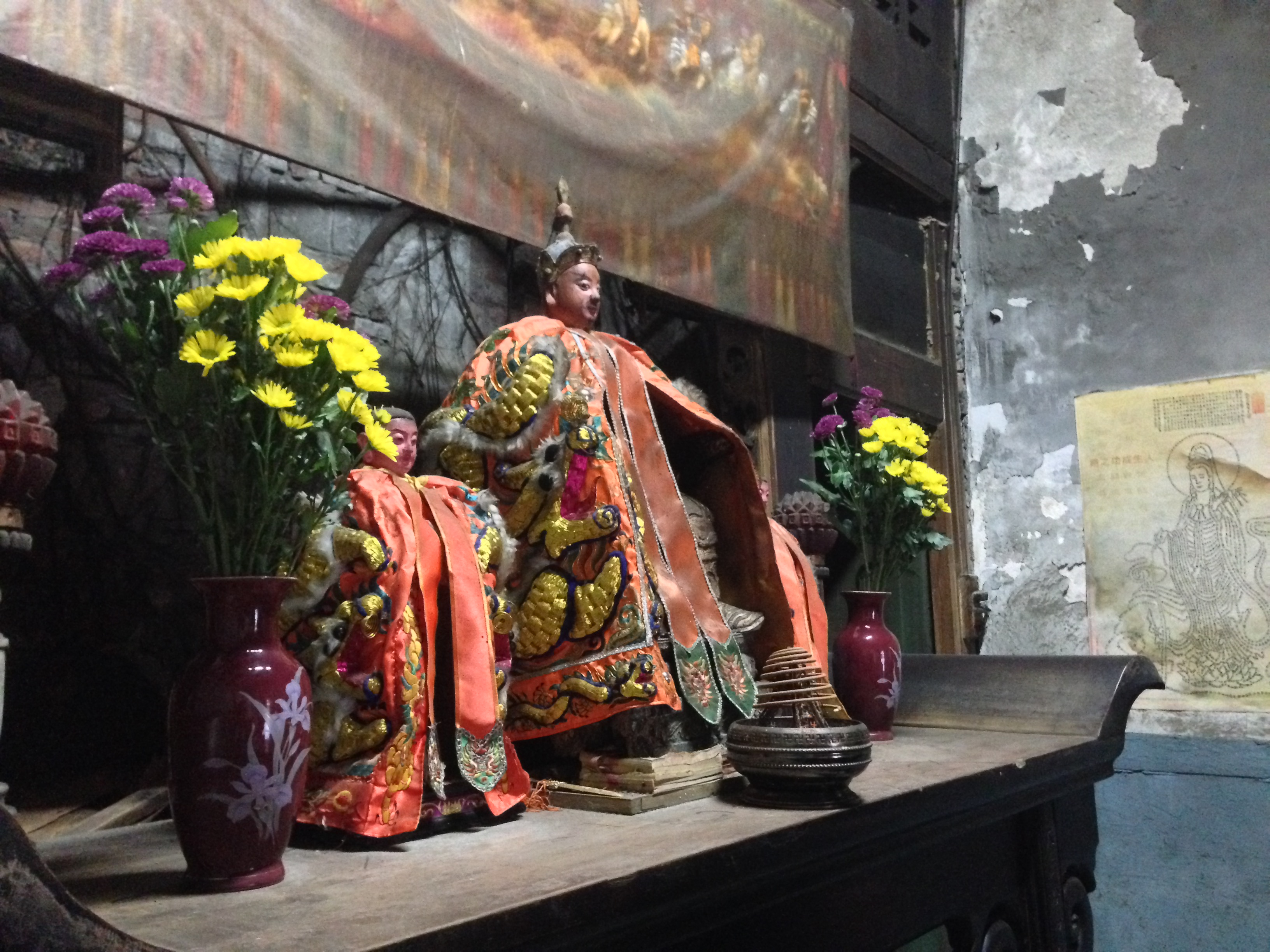 迪毅堂神像